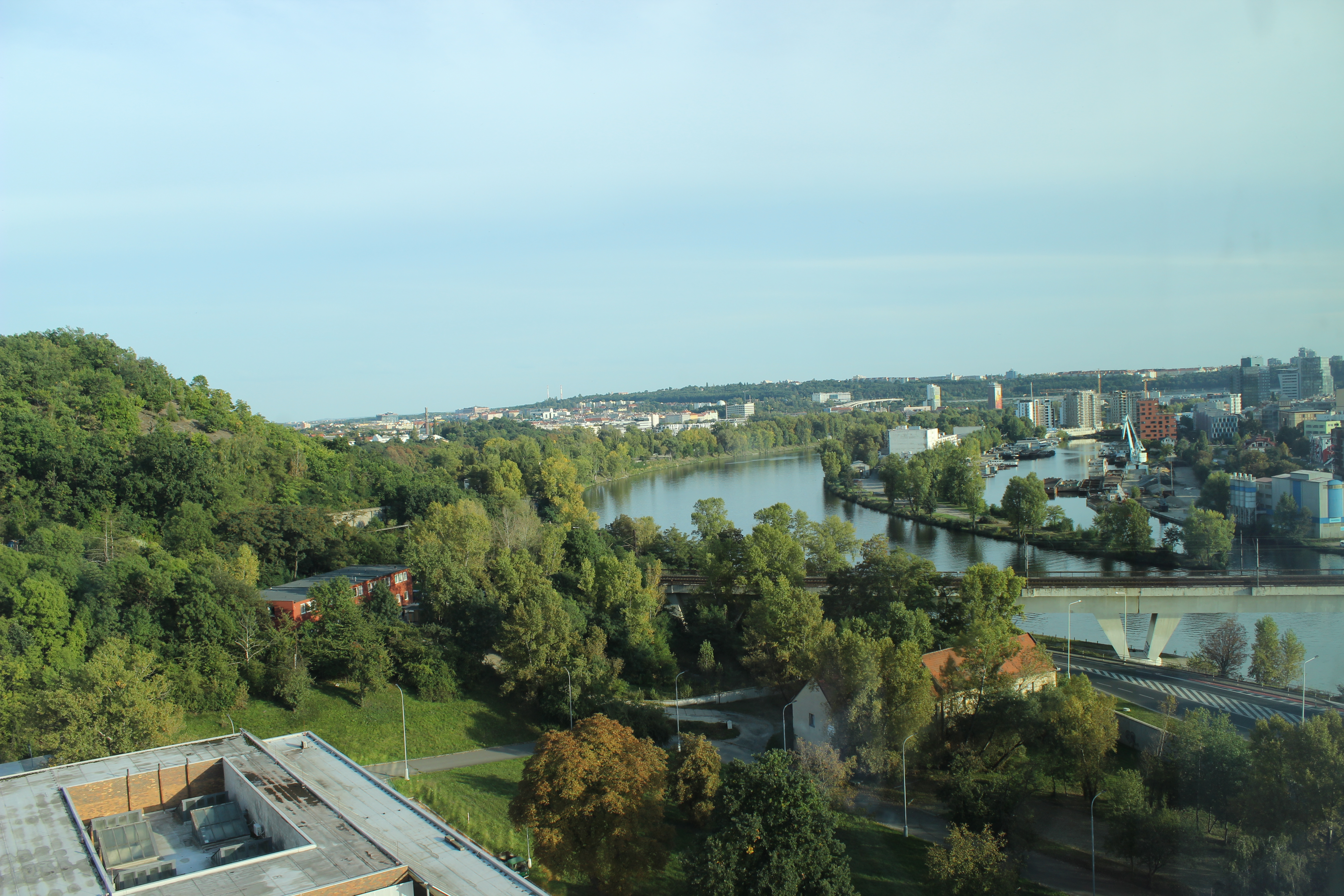 Výhled z jedenáctého patra výškové budovy Matematicko-fyzikální fakulty Univerzity Karlovy.